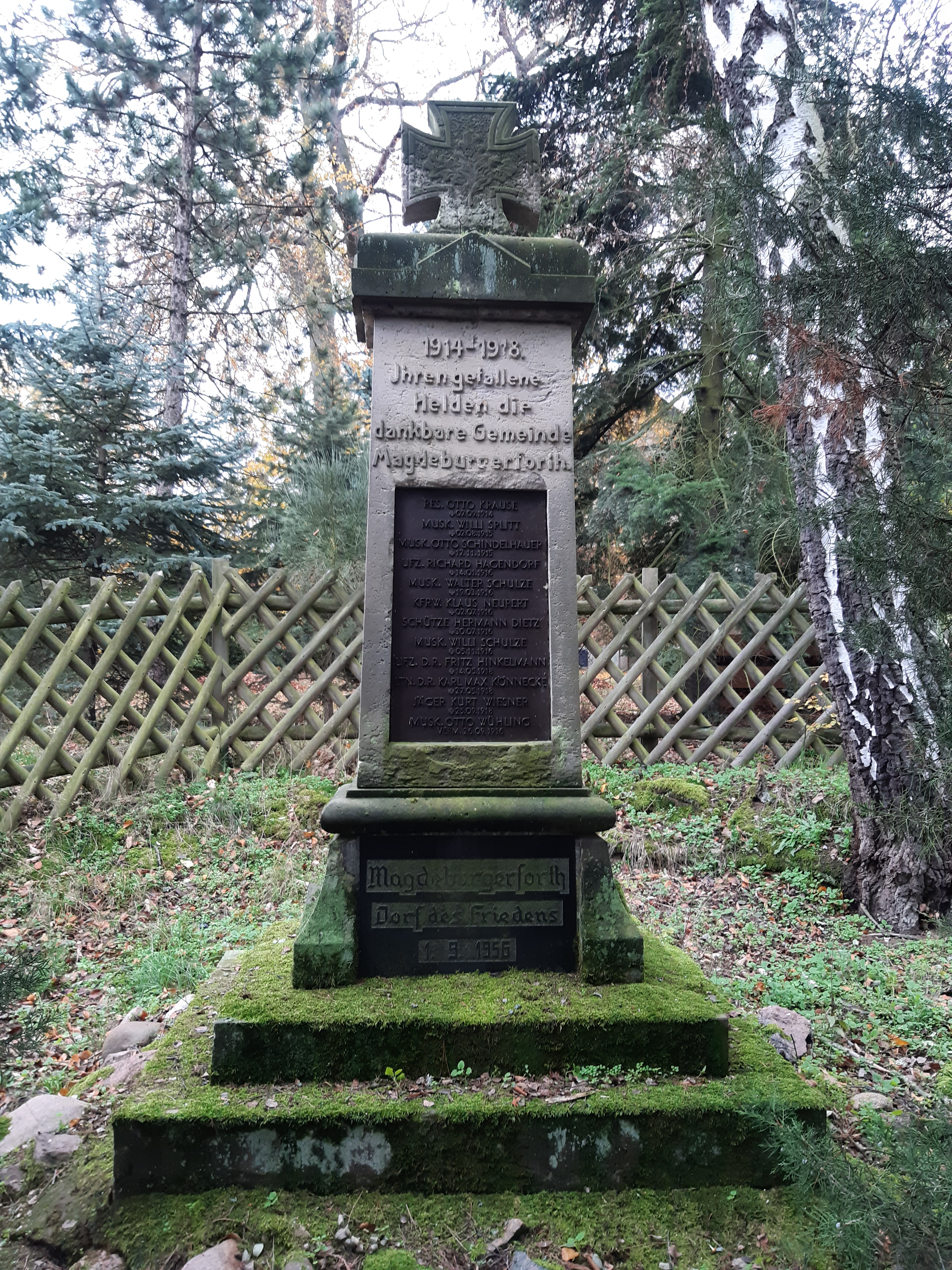 Kriegerdenkmal